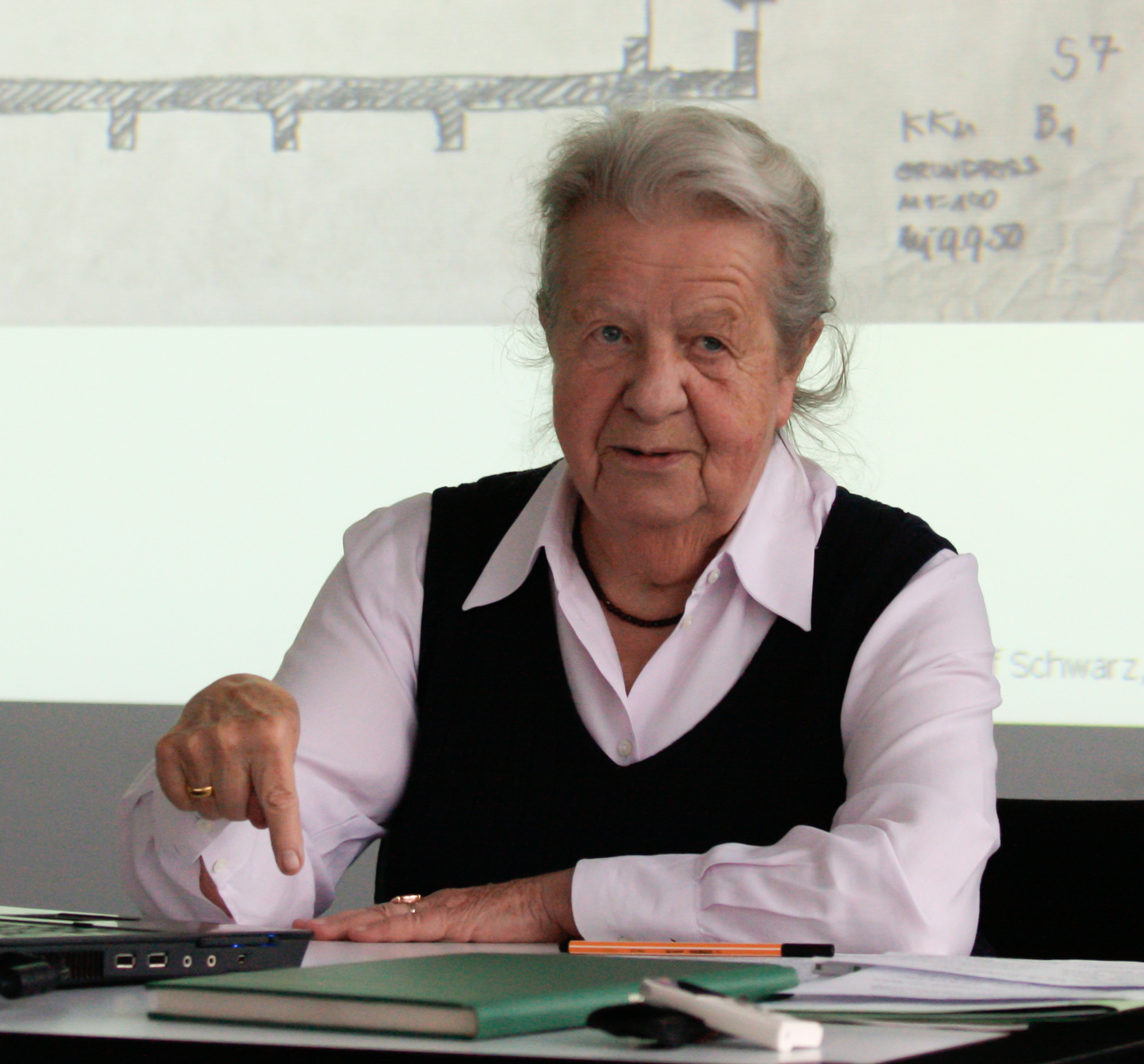 Architektin Maria Schwarz bei einem Vortrag zum Nachlass Rudolf Schwarz' im Historischen Archiv des Erzbistums Köln